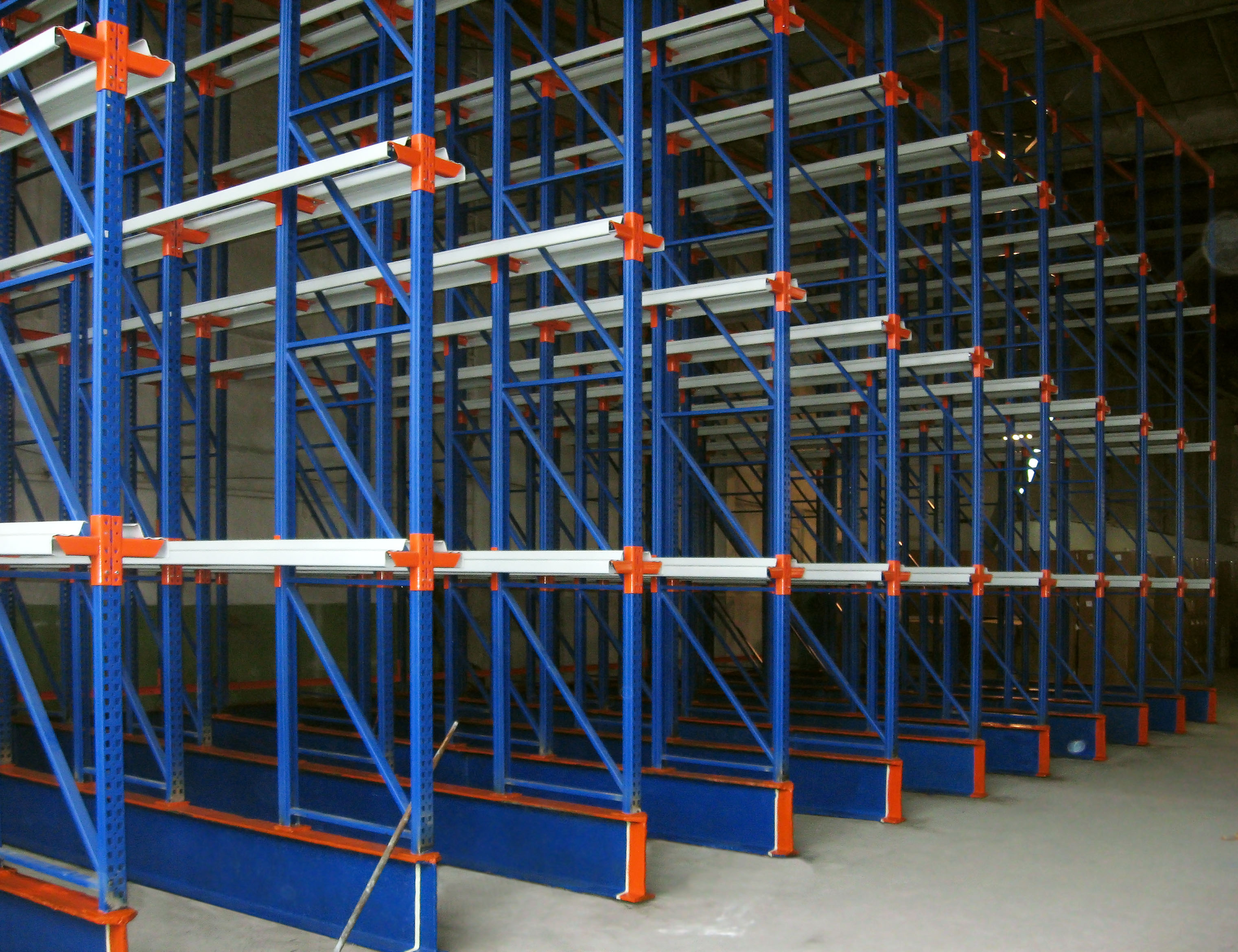 Фото вьездной конструкции